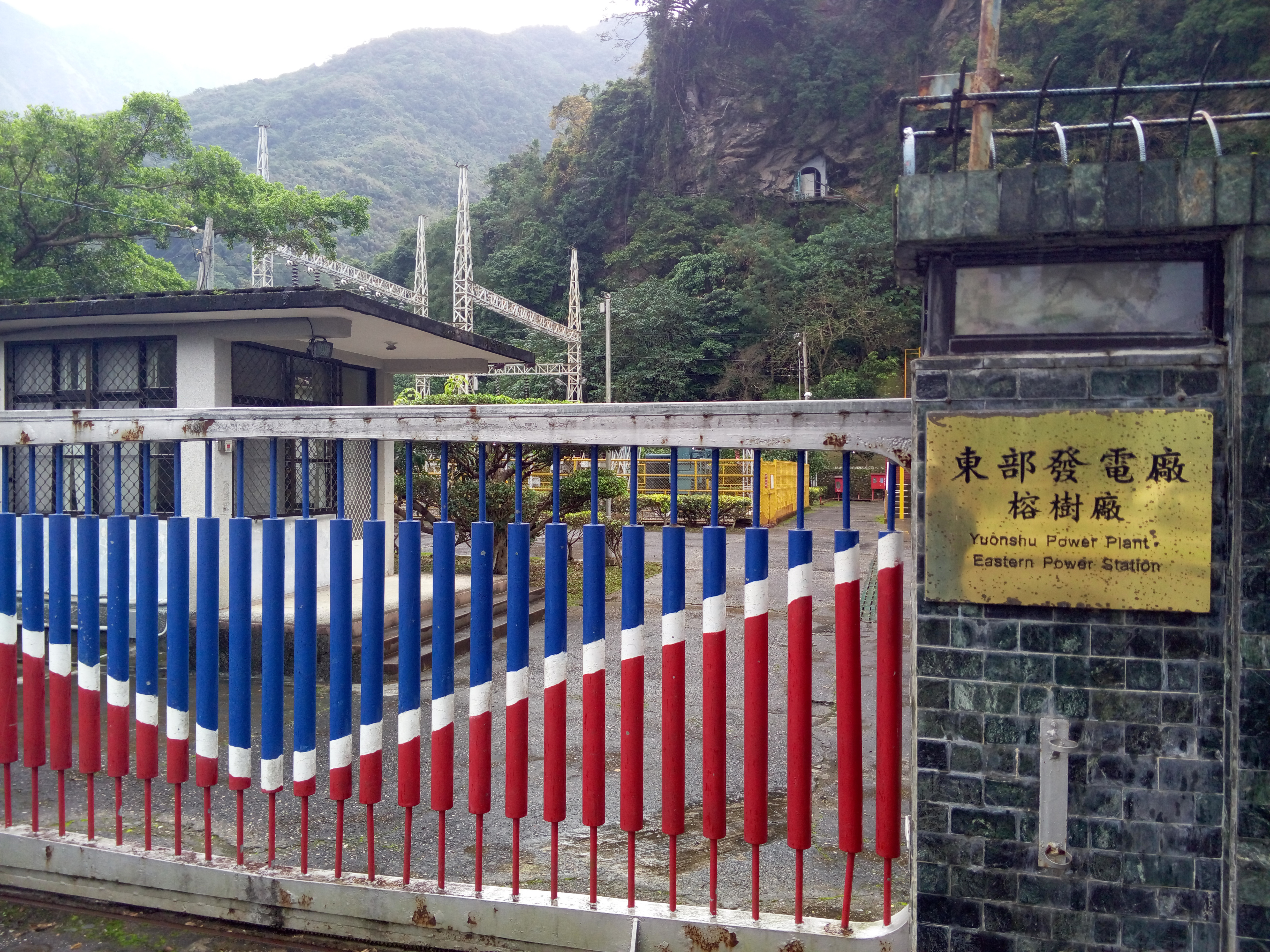 東部發電廠榕樹機組大門及門牌